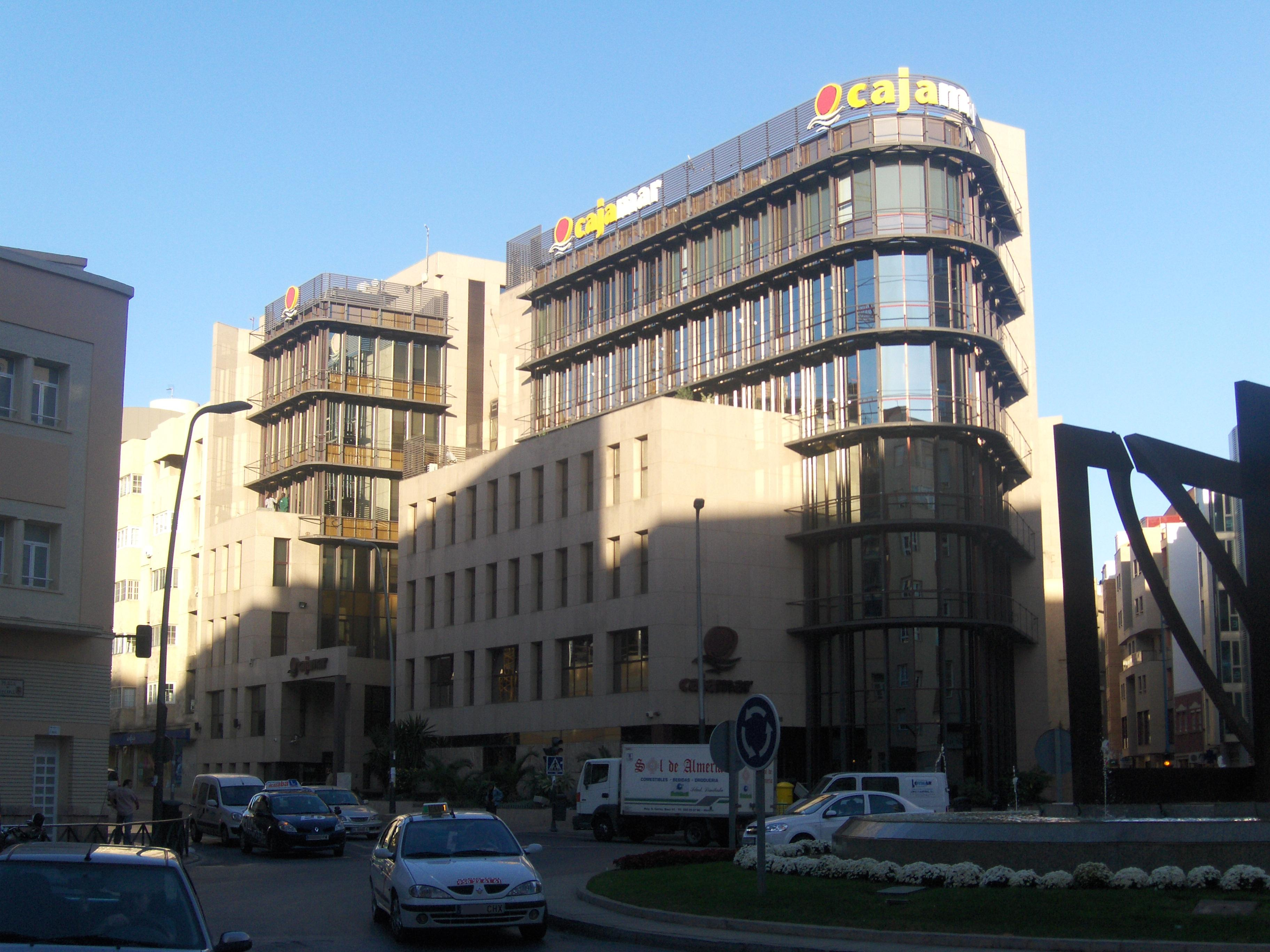 Sede social de Cajamar Caja Rural